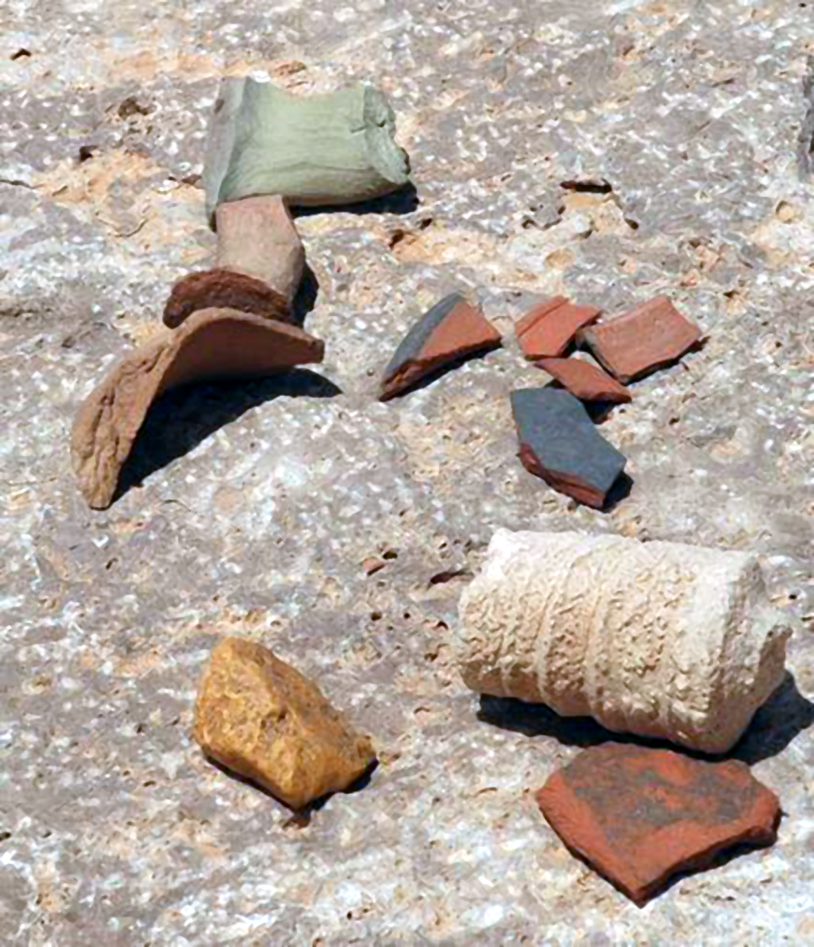 Das Kastell Gholaia, das durch antike Quellen auch als castra Chol(aia), [G]olas sowie in der Tabula Peutingeriana als Chosol überliefert ist, war ein römisches Militärlager, das für Sicherungs- und Überwachungsaufgaben am vorderen Limes Tripolitanus, einem tiefgestaffelten System von Kastellen und Militärposten, in der römischen Provinz Africa proconsularis zuständig war. Lesefunde aus dem Kastellareal, darunter befinden sich Wand- und Randscherben, sowie Henkel typischer römischer Gebrauchskeramik, die dem 3. Jahrhundert zugeordnet werden können.